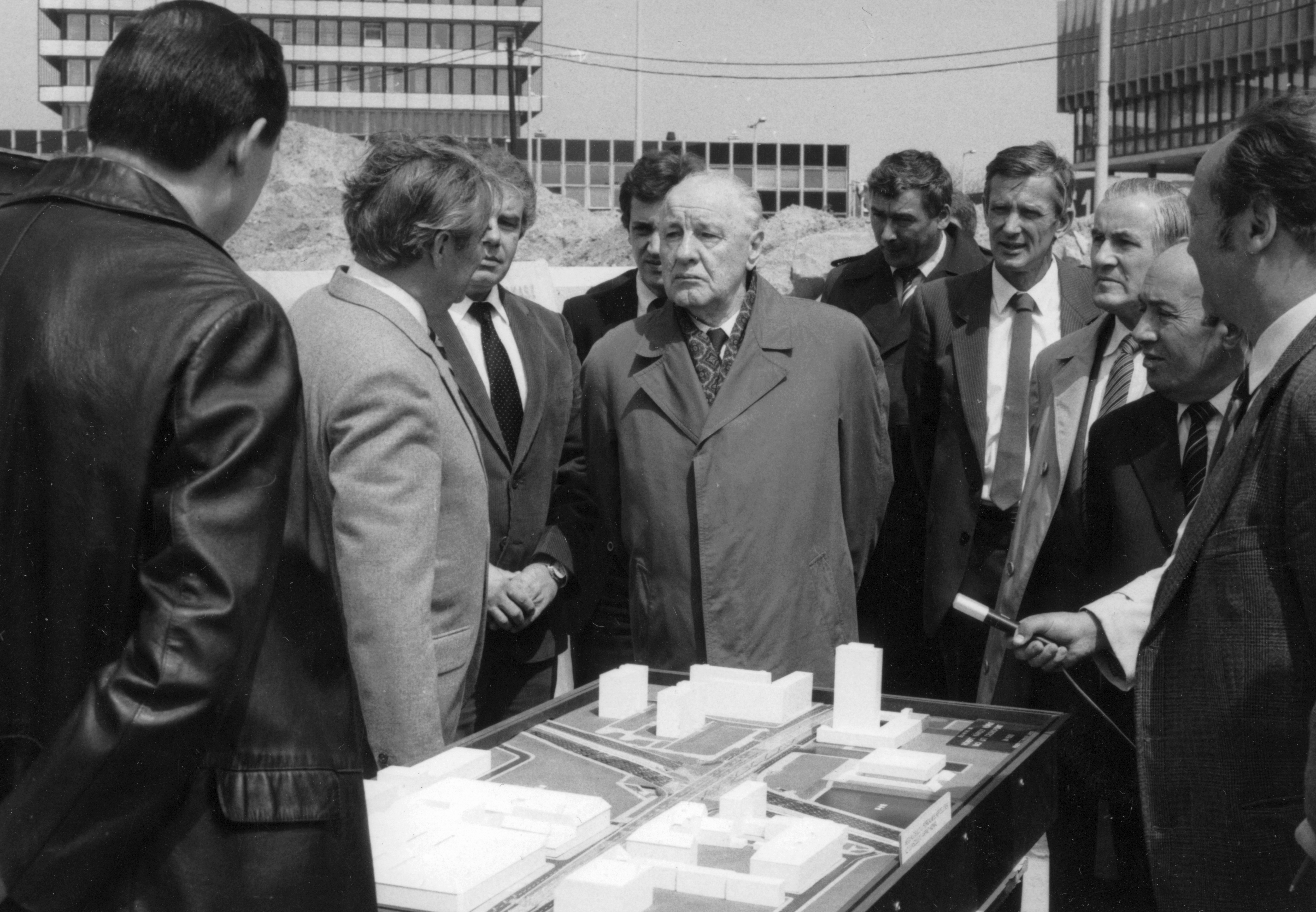 BUDAPEST XIII. Váci út - Róbert Károly körút sarok, Dalmy Tibor kormánybiztos (világos zakóban) tájékoztatja Kádár Jánost az Árpád hídi közlekedési rendszer építéséről. Közöttük Bornemissza Sándor kerületi tanácselnök, szemben kigombolt zakóban Iványi Pál későbbi budapesti tanácselnök.